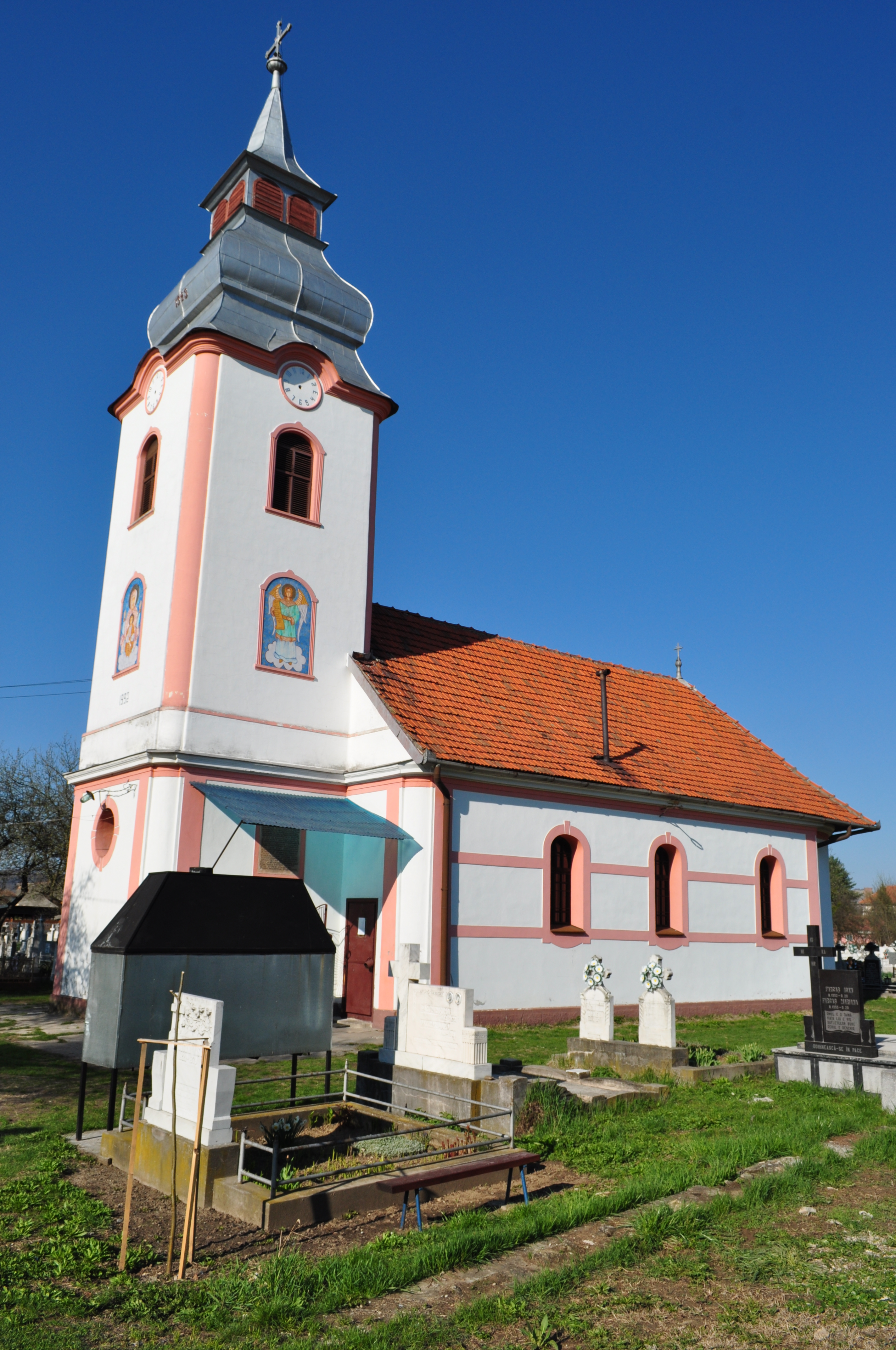 Ilia, județul Hunedoara